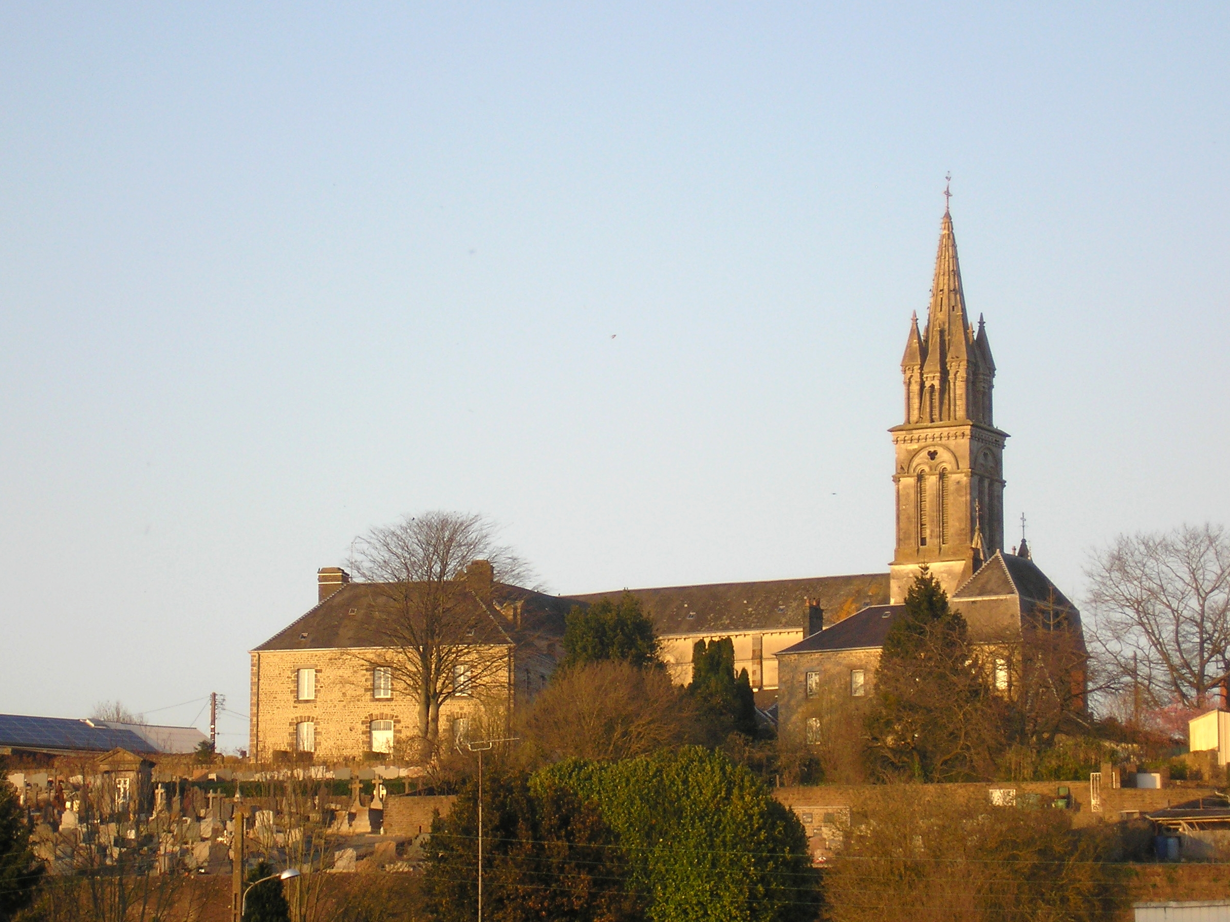 Gorron (Pays de la Loire, France). L'église Saint-Martin.